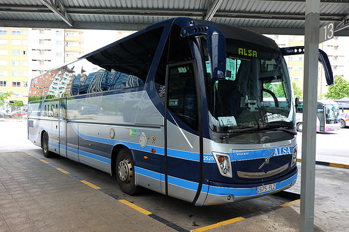 Autobús de Alsa